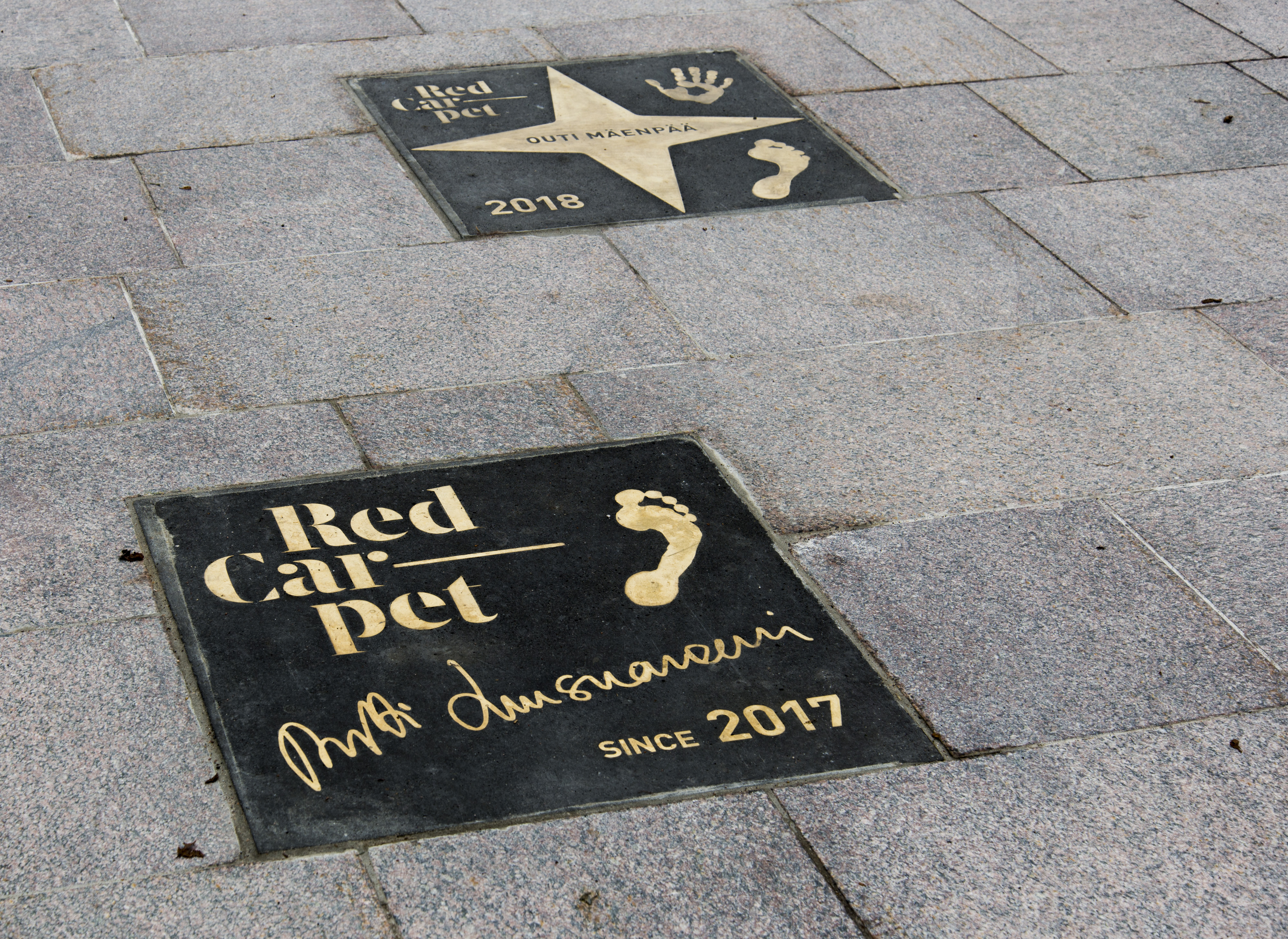 Hyvinkään Tähtiraitti vuonna 2018.